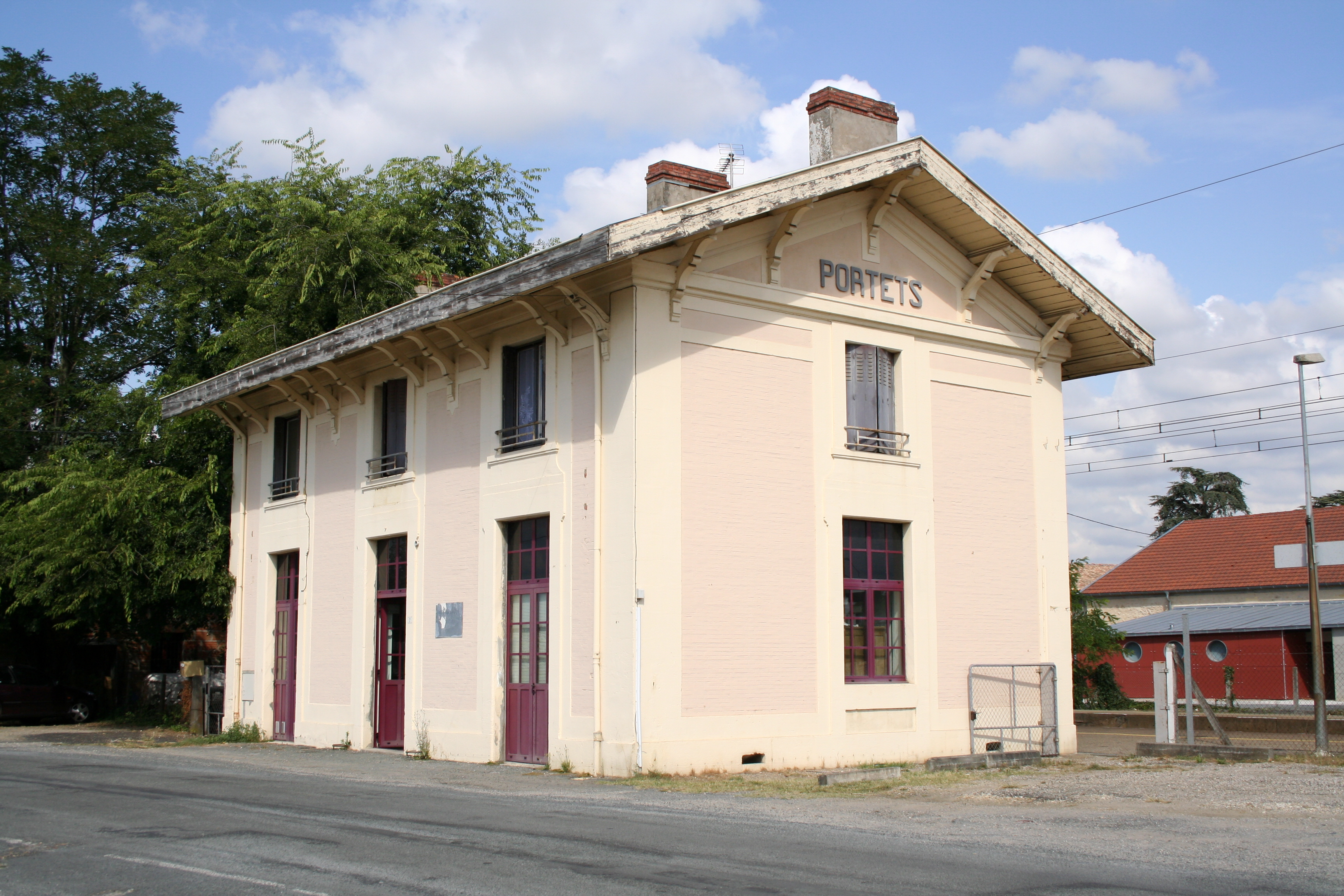 Ex-BV de Portets